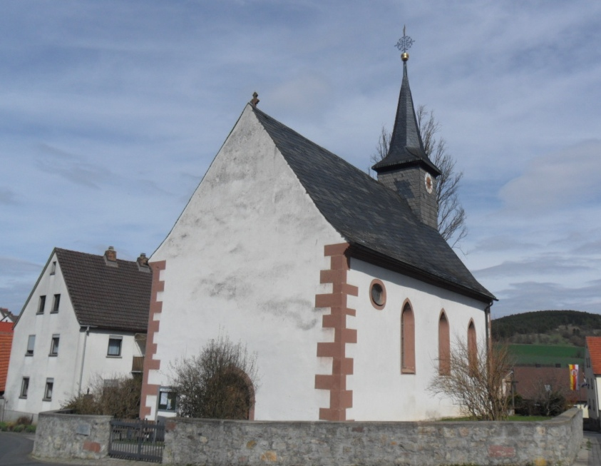 evangelisch-lutherische Petruskirche in Unterleinach